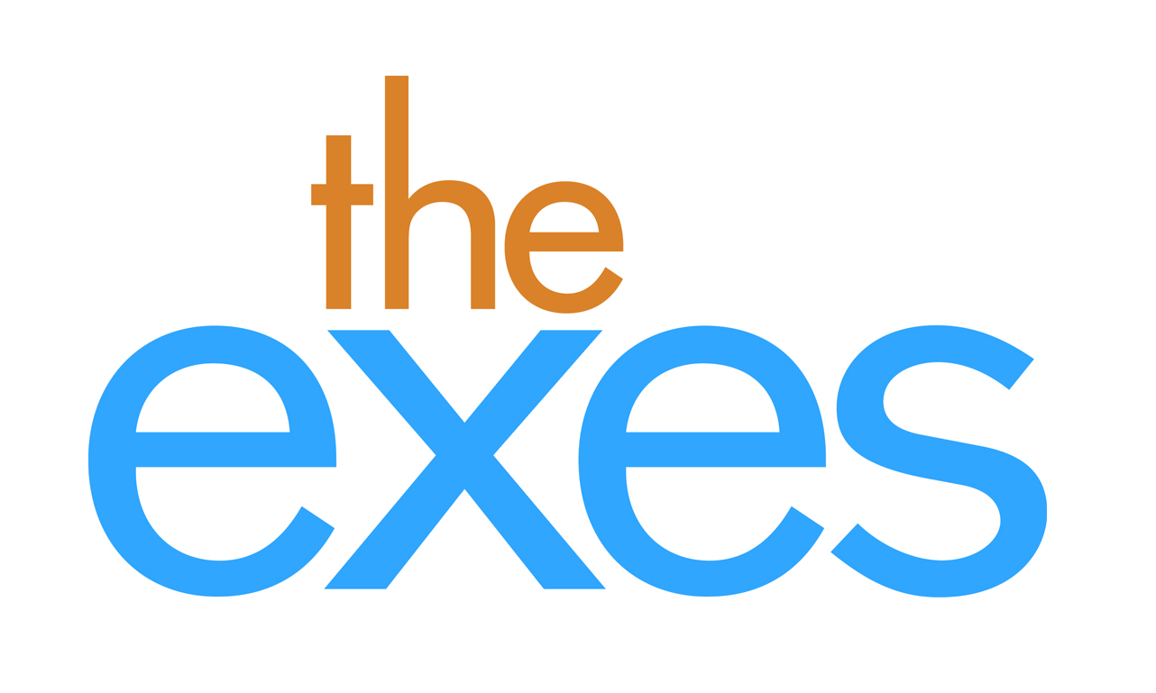 Diese Grafik zeigt das Logo der TV Serie The Exes